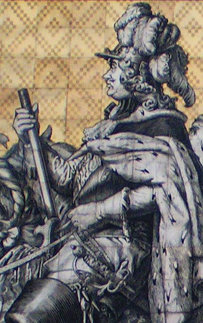 Dresdner Fürstenzug Copyright Status: GNU-FDL Freie Dokumentationslizenz Afbeelding:Dresden Fuerstenzug Johann Georg III.jpeg